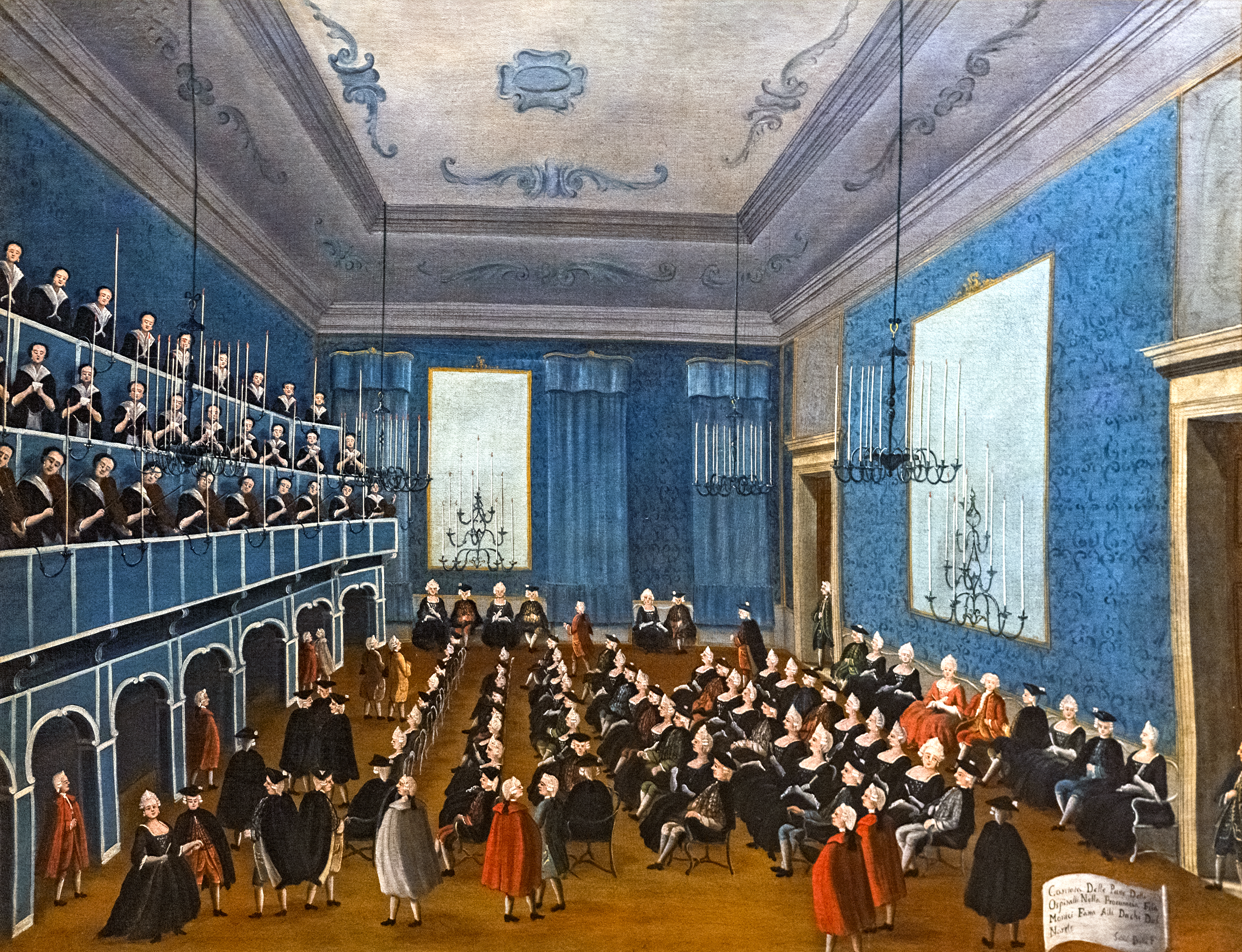 Cantate exécutée par les jeunes filles des quatre "ospedali" lors de la visite incognito à Venise du 18 au 25 janvier 1782 des héritiers du trône de Russie : le grand duc Paolo Petrowitz, fils de Pierre III et de Catherine II, puis tsar sous le nom de Paul Ier, et son épouse. Trois soirs de suite, des spectacles ont été donnés en leur honneur au "Casino dei Filarmonici" représenté sur la toile. Quatre hospices musiciens ont été fondés à Venise par des religieux ou des civils aux XVIe et XVIIe siècle, en période de famine, pour recueillir les enfants trouvés dans les rues, orphelins ou malades. Ces établissements subsistaient grâce à la charité publique, les enfants y apprenaient un métier pour leur permettre de s'insérer dans la société. Des maîtres de musique étaient présents dans chaque hospice mais les leçons de musique y étaient réservées aux filles. Entre 1650 et 1750, la musique y occupe une place grandissante. Le "chœur" d'un établissement pourra compter jusqu'à 100 jeunes filles, chanteuses et instrumentistes.